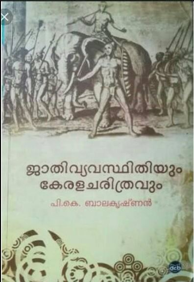 കേരളചരിത്ര സംഗ്രഹം